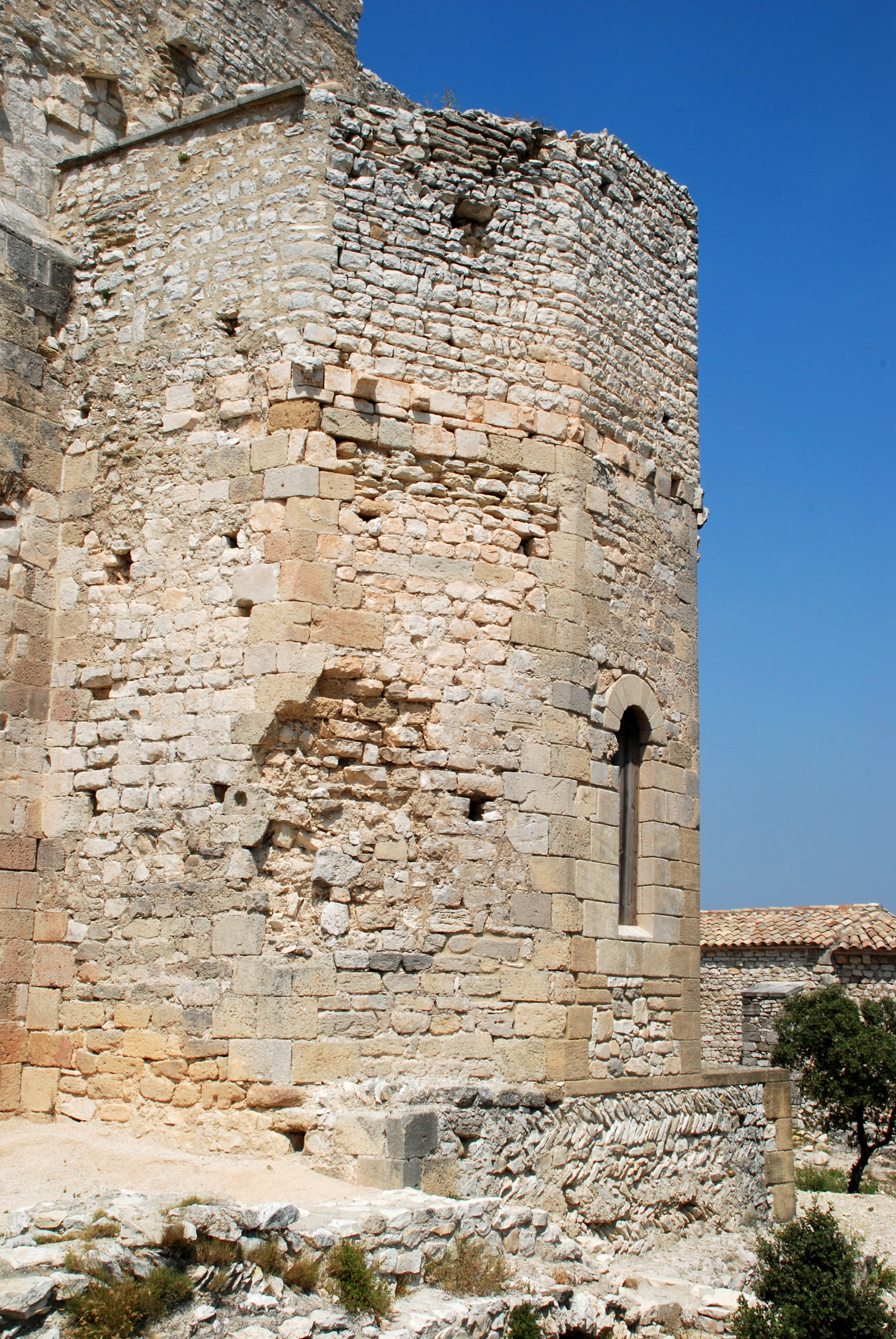 France - Provence - Vaucluse - Le Thor - Église Sainte-Marie de Thouzon